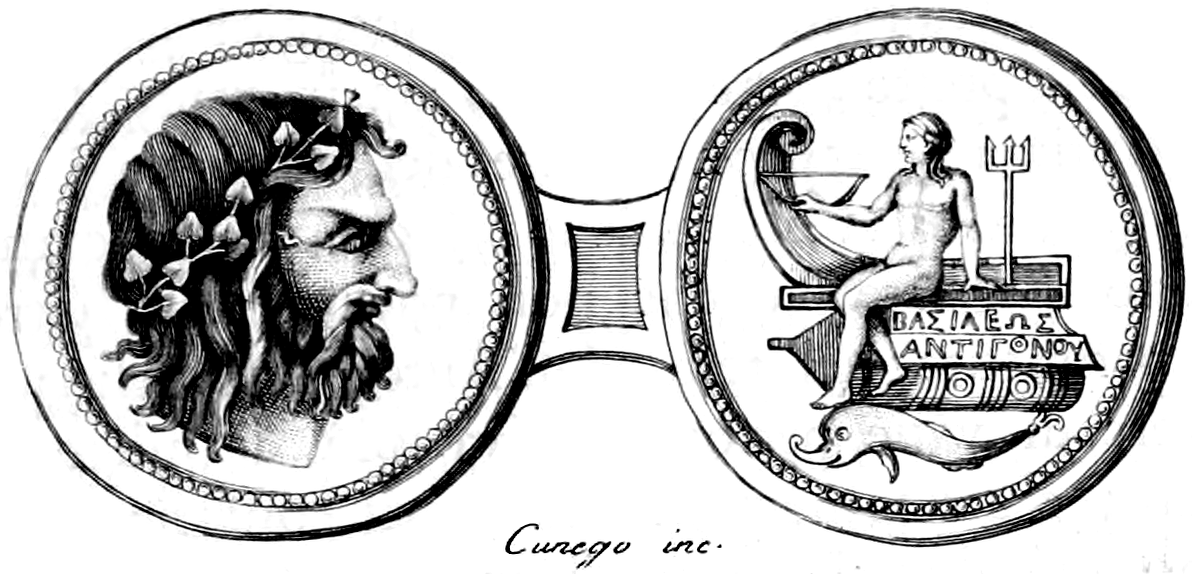 Illustrazione da Storia delle arti del disegno, di Johann Joachim Winckelmann, Roma, Stamperia Pagliarini, 1783.